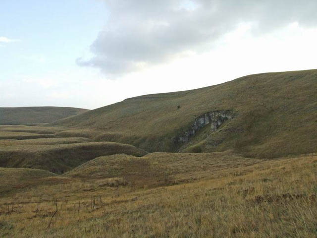 Крашка депресија Понор